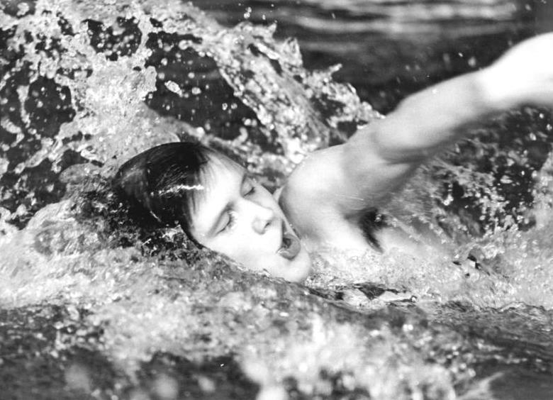 Ulrike Tauber ADN-ZB Mittelstädt 11.2.78 Rostock: XI. DDR-Hallenmeisterschaften im Schwimmen Herausragenden Siegerzeit in den Finalrennen am 11.2. auf den 25-m-Bahnen des Neptunbades in Rostock war die Weltbestleistung für Kurzbahnen, die von Olympiasiegerin Ulrike Tauber (SC Karl-Marx-Stadt) über 200 m Lagenmit 2:14,50 min erzielt wurde. Einen weiteren Erfolg feierte sie überraschend auf der 200-m-Bruststrecke. Mit 2:34,69 min ließ sie Spezialistinnen wie Ramona Reinke (SC DHfK Leipzig) hinter sich. (Foto wurde bei einem früheren Wettkampf aufgenommen.) Abgebildete Personen: Tauber, Ulrike: Schwimmerin, SC Karl-Marx-Stadt, Olympiade 1976 und 1980, DDR